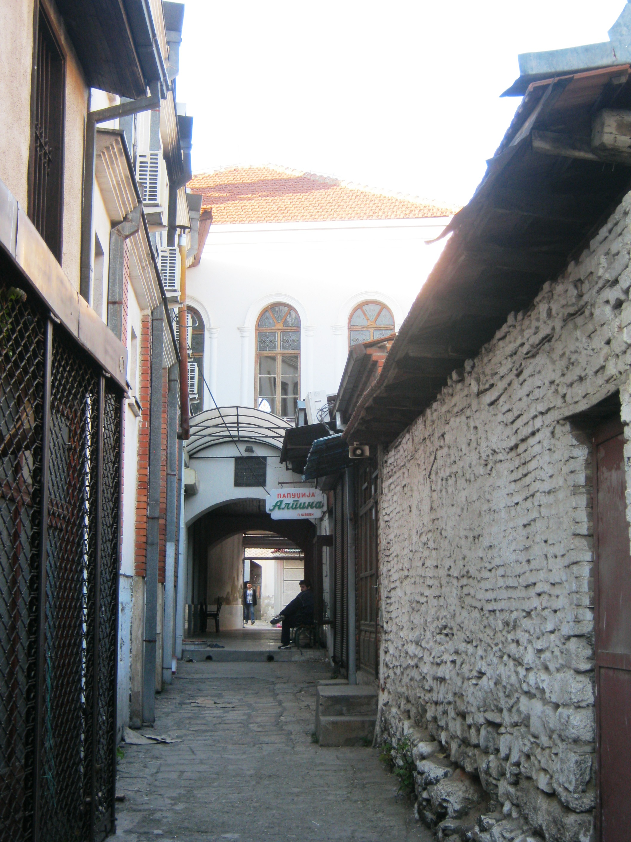 Џамија Ќосе Кади